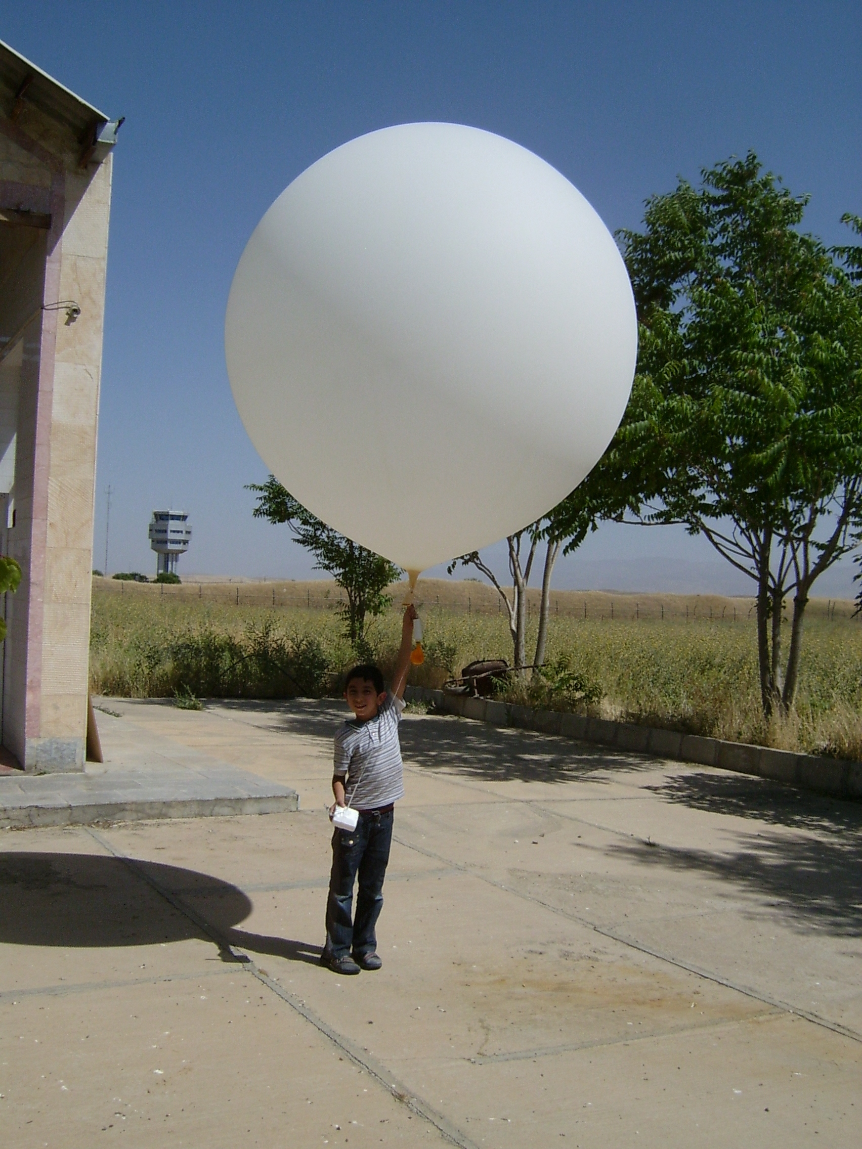 بالون 600 گرمی در حالیکه رادیوسوند به آن متصل شده برای ارسال به جوّ از اتاق گاز بیرون آورده شده است